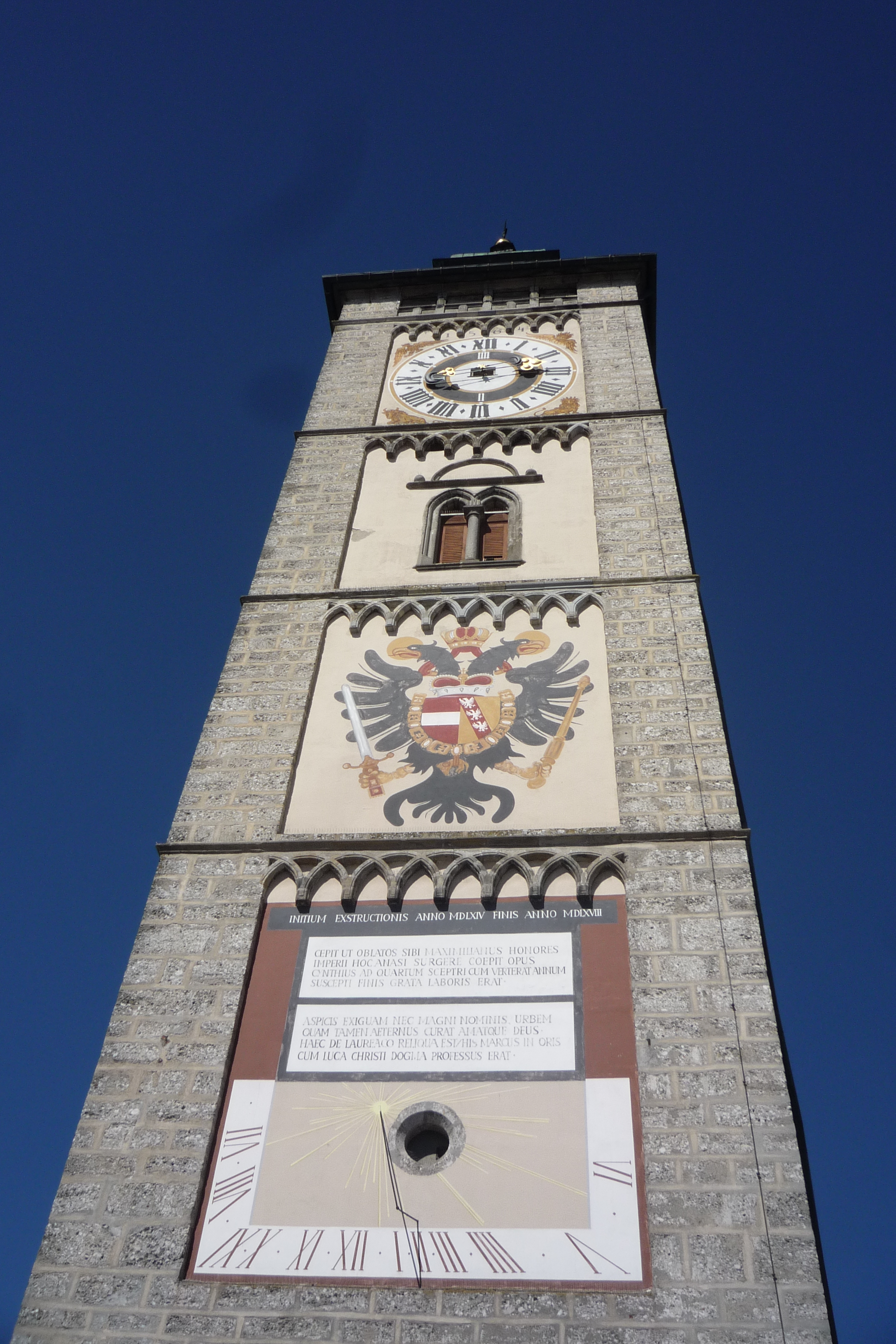 Turmbemalung Südseite